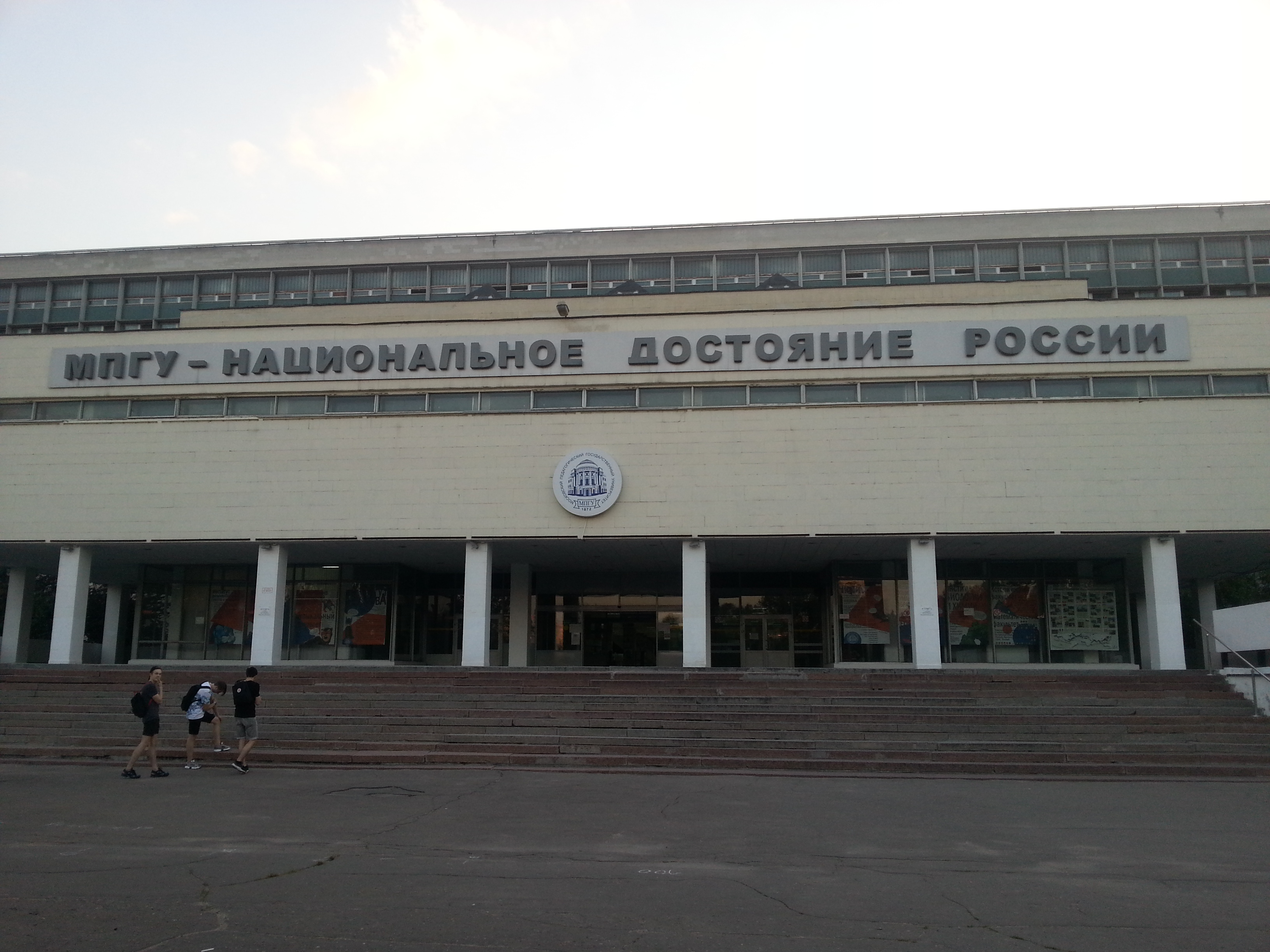 Вид на корпус гуманитарных факультетов МПГУ имени Ленина вечером. 30 июня 2016г.